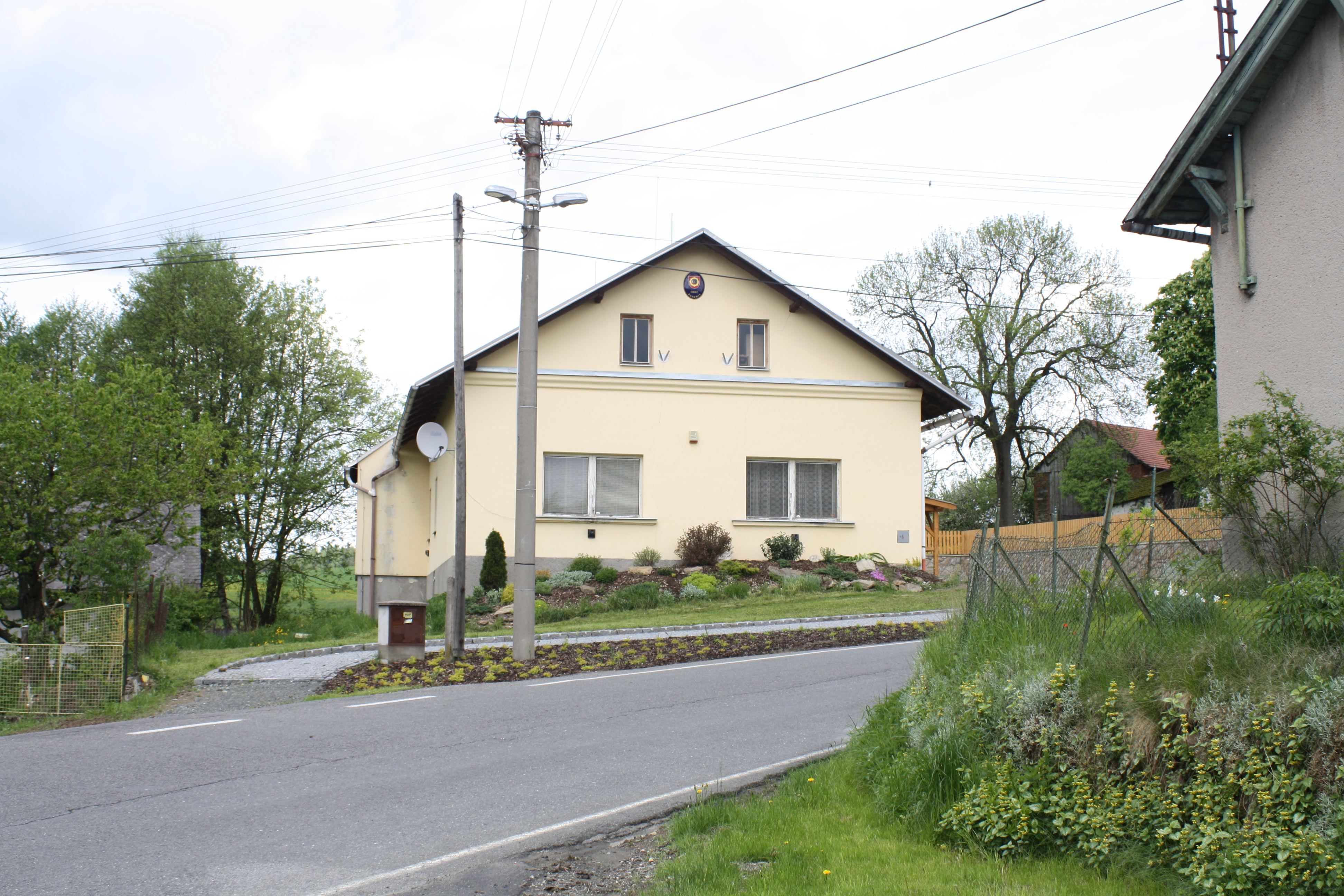 Budova, ve které se nacházala do 1.8 1967 Základní škola